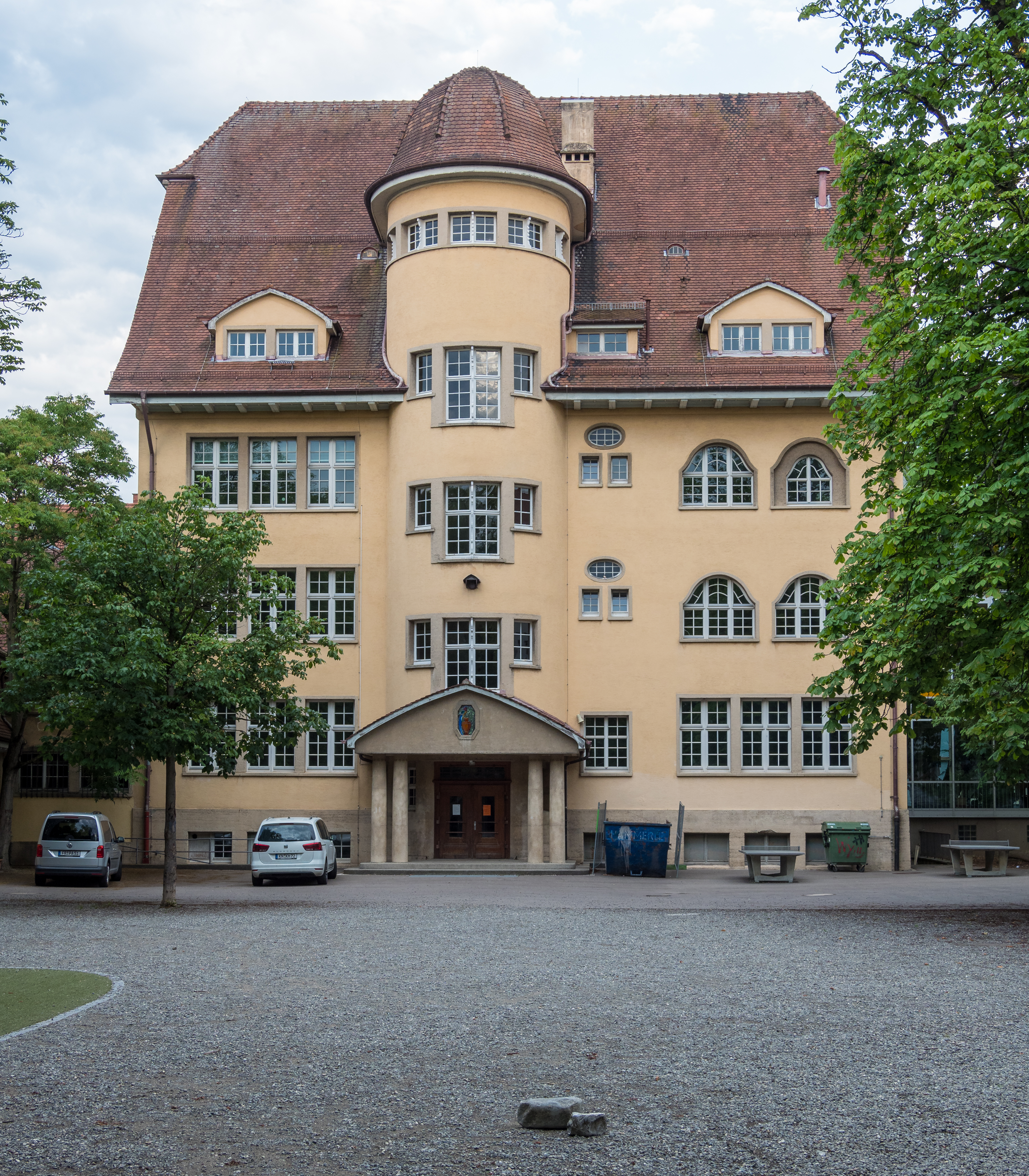 Ellenrieder-Gymnasium Konstanz (Westseite)